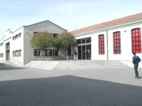 Concejalía de Innovación, Industria y Promoción Económica del Ayuntamiento de Sabadell. Se establece en el Vapor Llonch el año 1991.